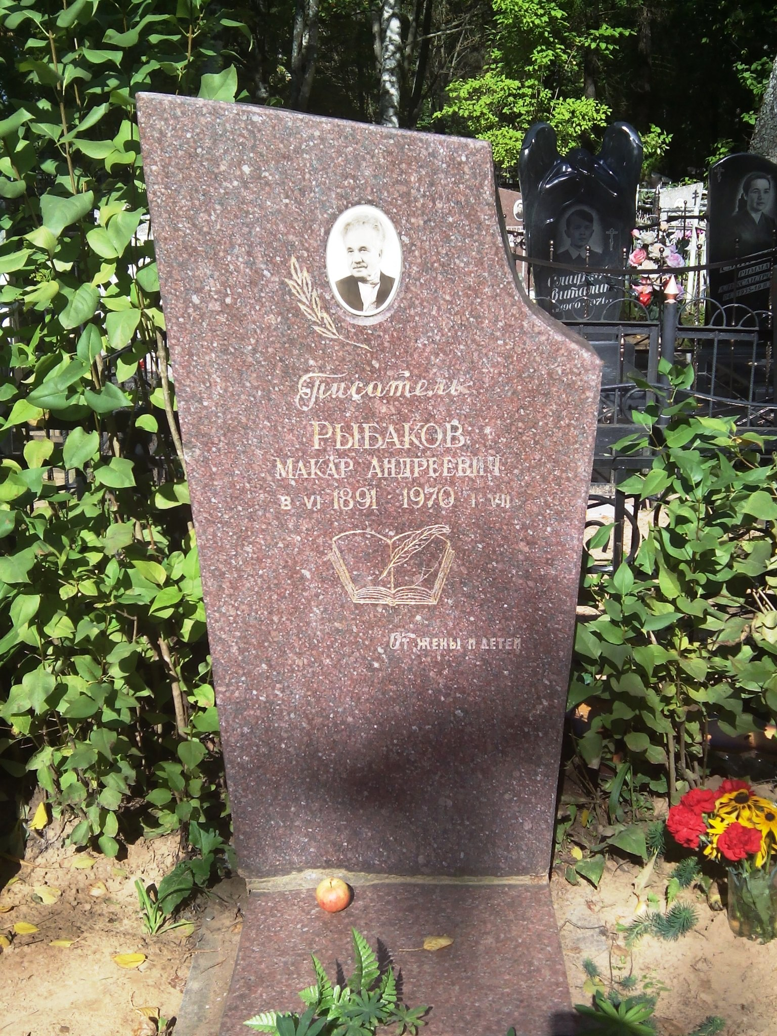 Писатель